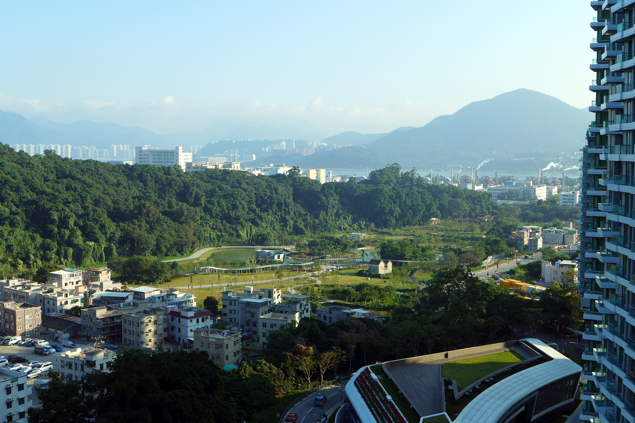 Le Jardin, Tai Po